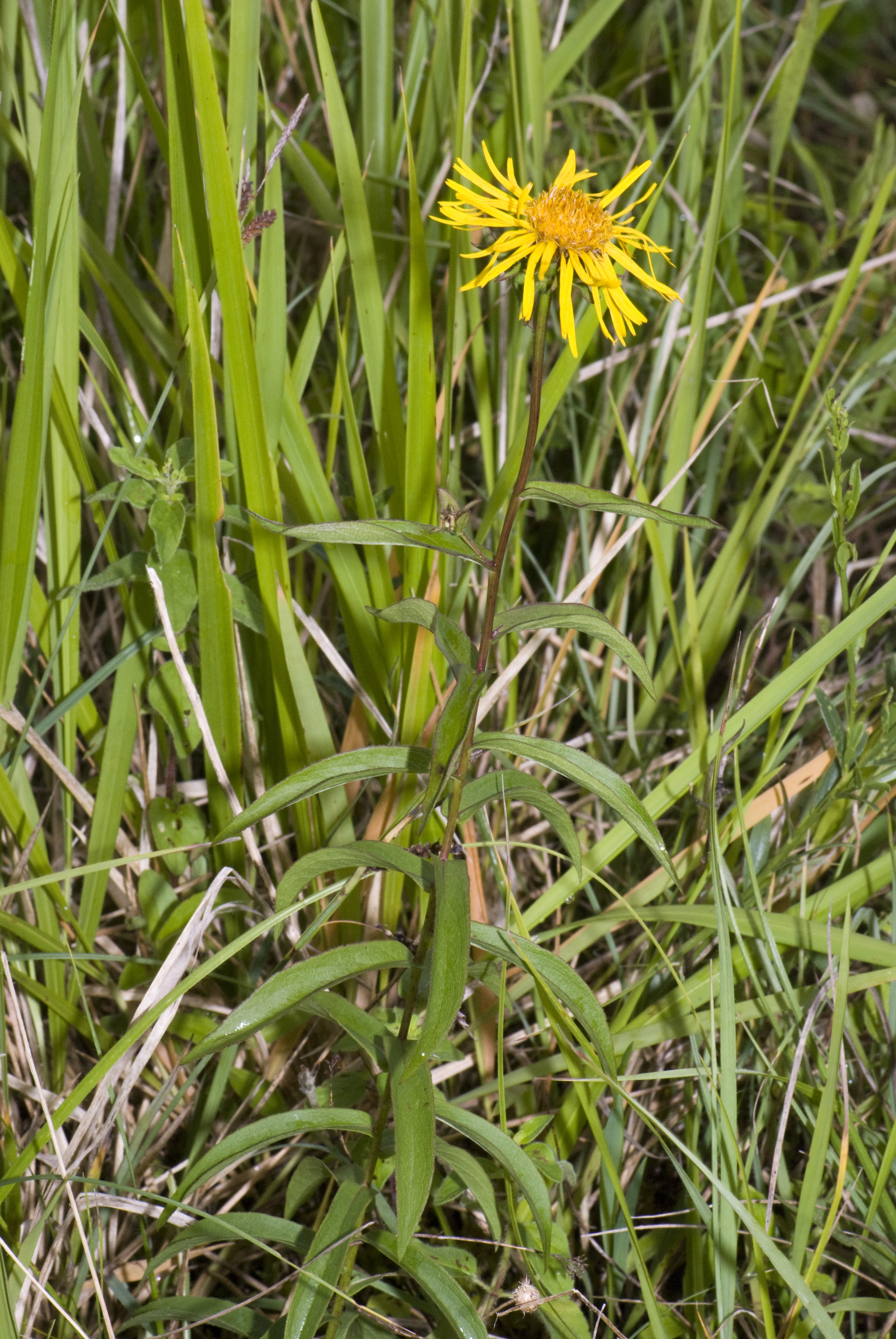 Inula salicina Coteau de Chartèves (Aisne), France